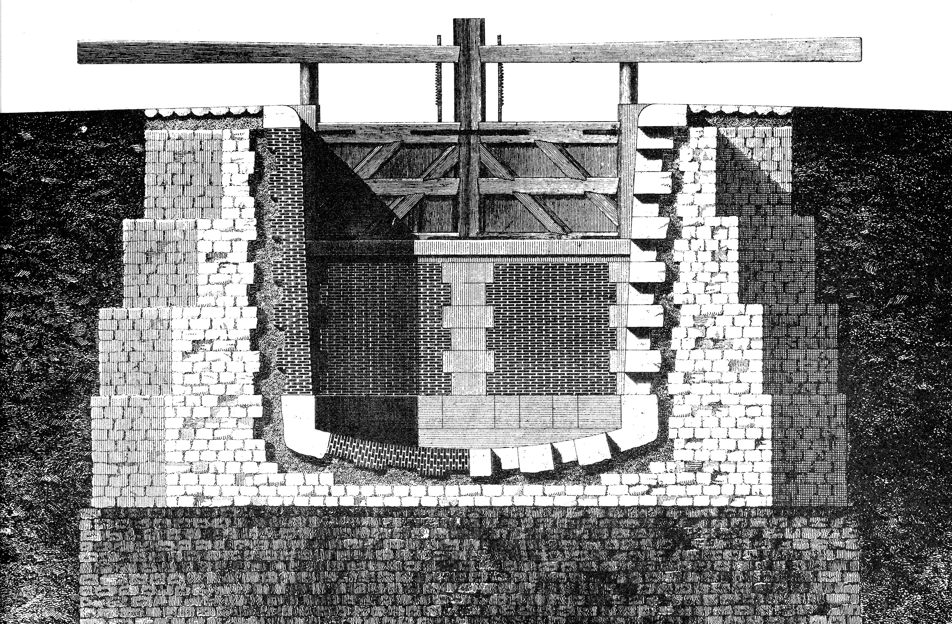 Canal de Bourgogne - Coupe d’une écluse , montrant les bajoyers en maçonnerie.